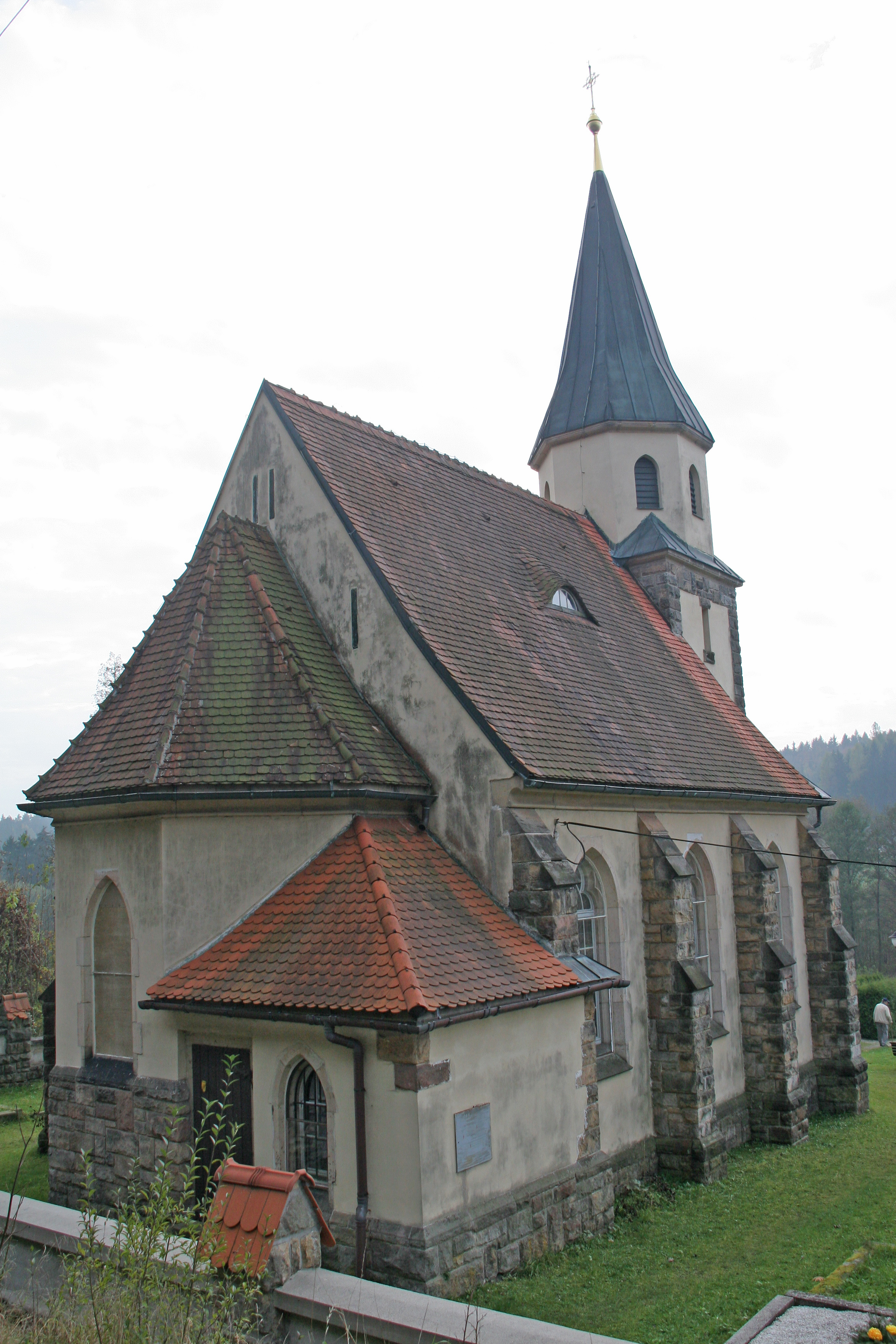 Mostek kaple svaté Anny